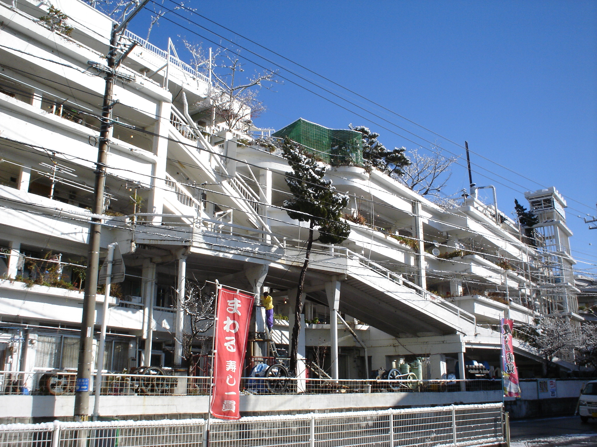 sawaman